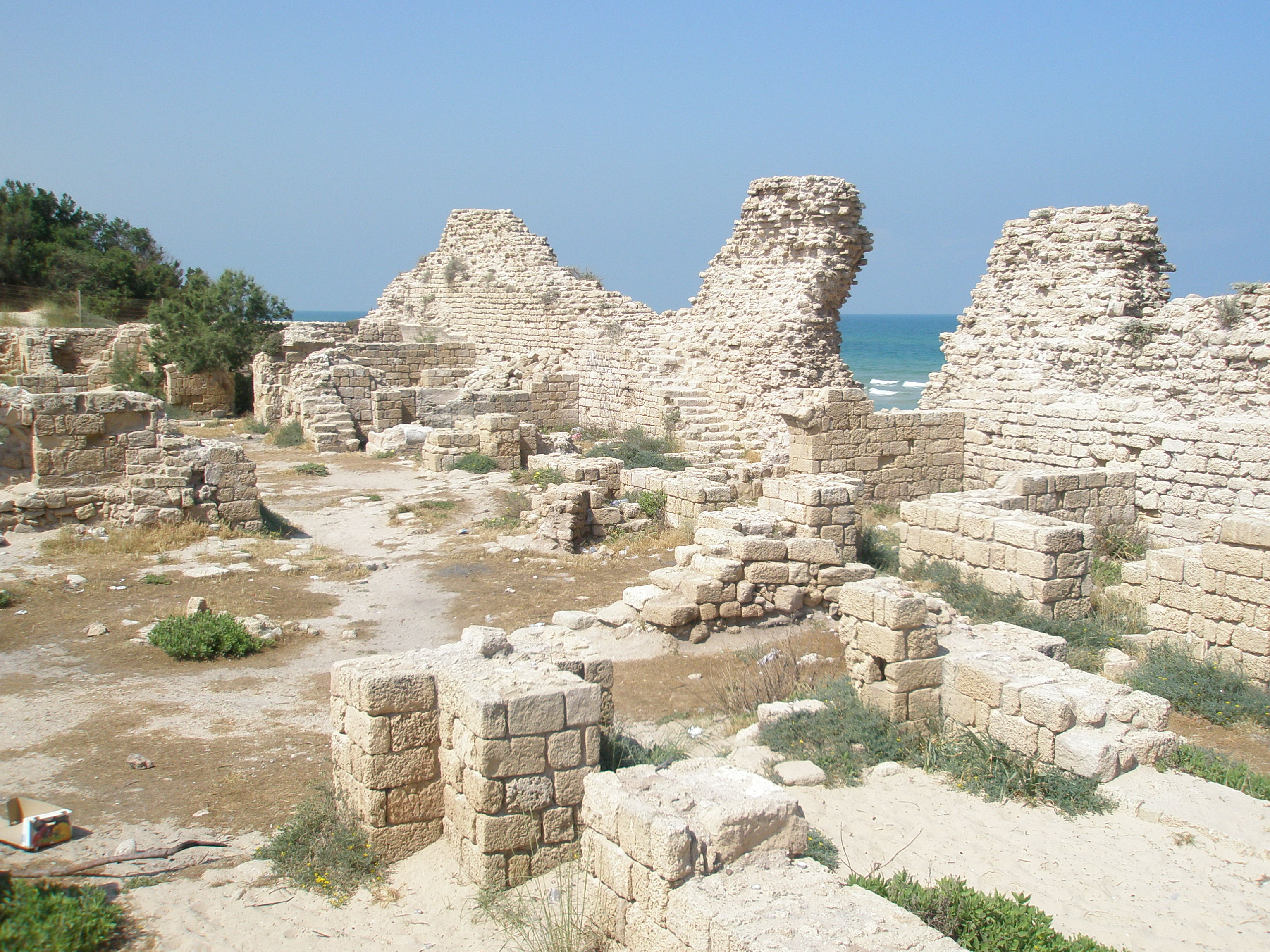 Ashdod Yam, Israel